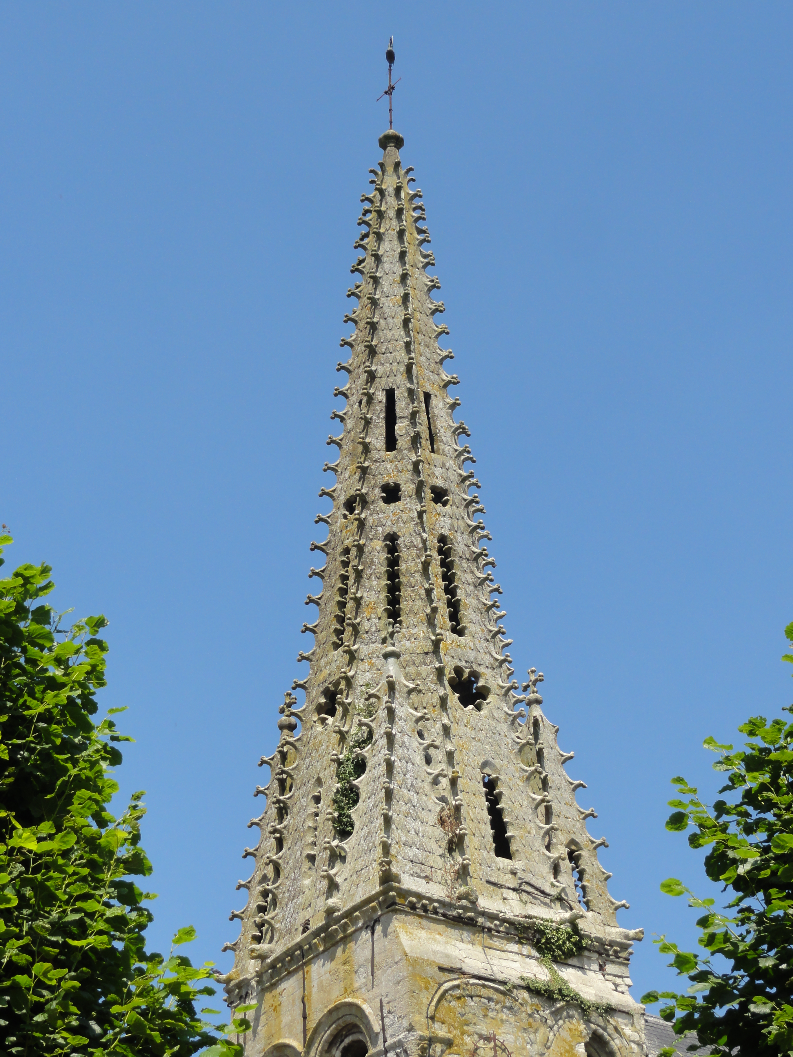 Voir titre.